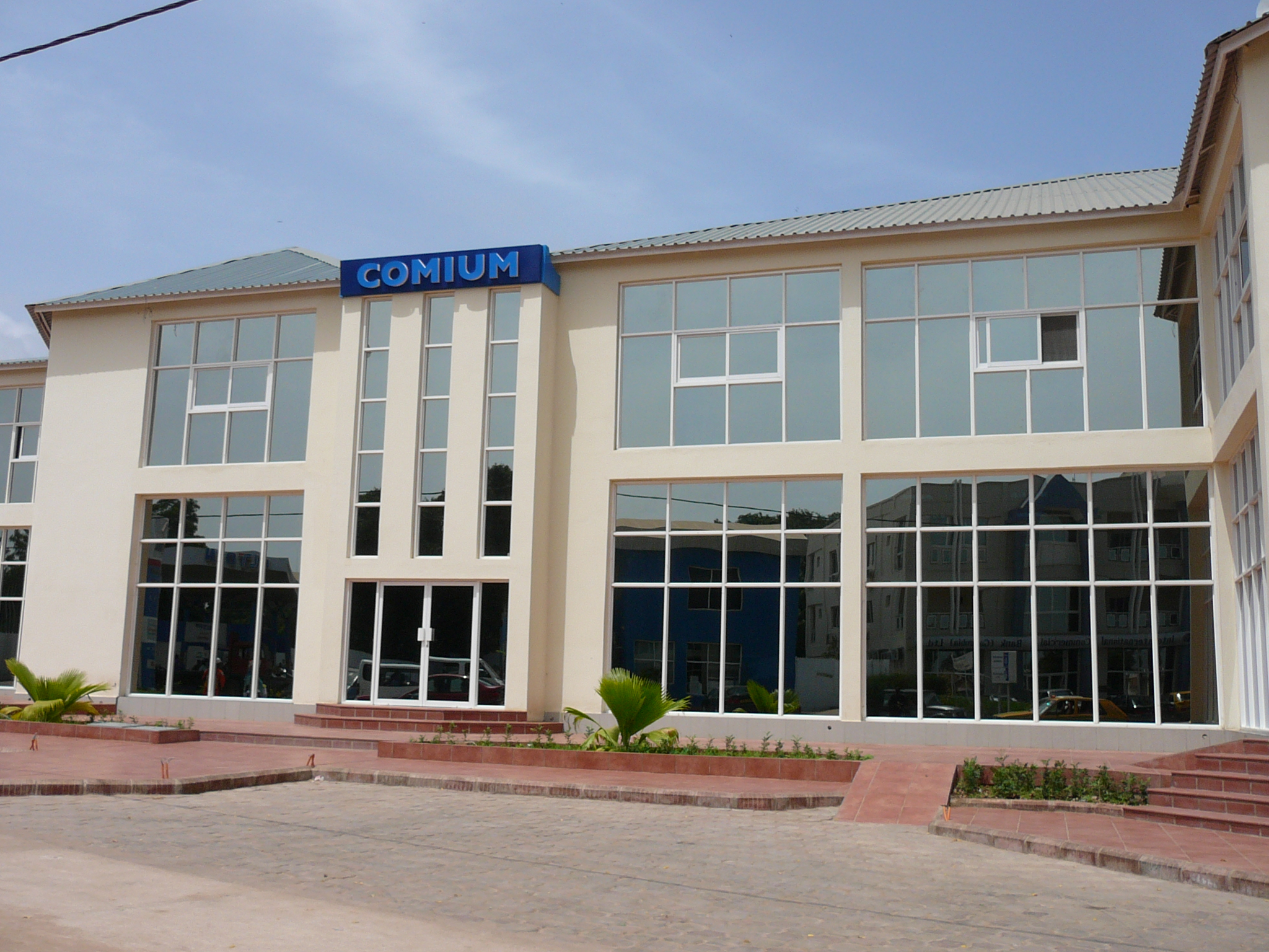 Comium, ab 2007 der dritte Mobilfunkanbieter in Gambia